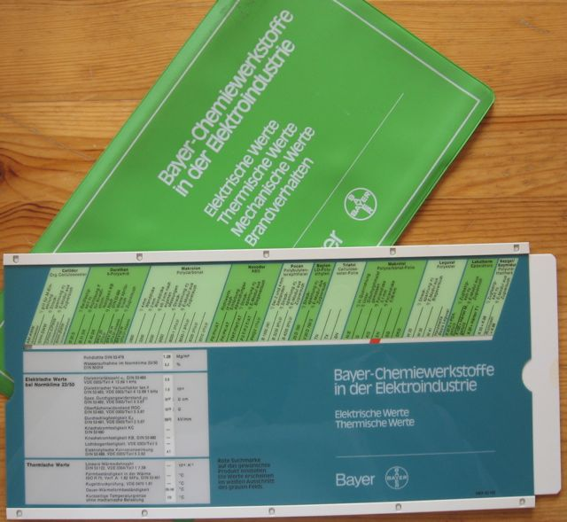 Datenschieber zu elektrischen, mechanischen und thermische Werten bei Brandverhalten. Hersteller "Bayer-Chemiewerkstoffe in der Elektroindustrie".